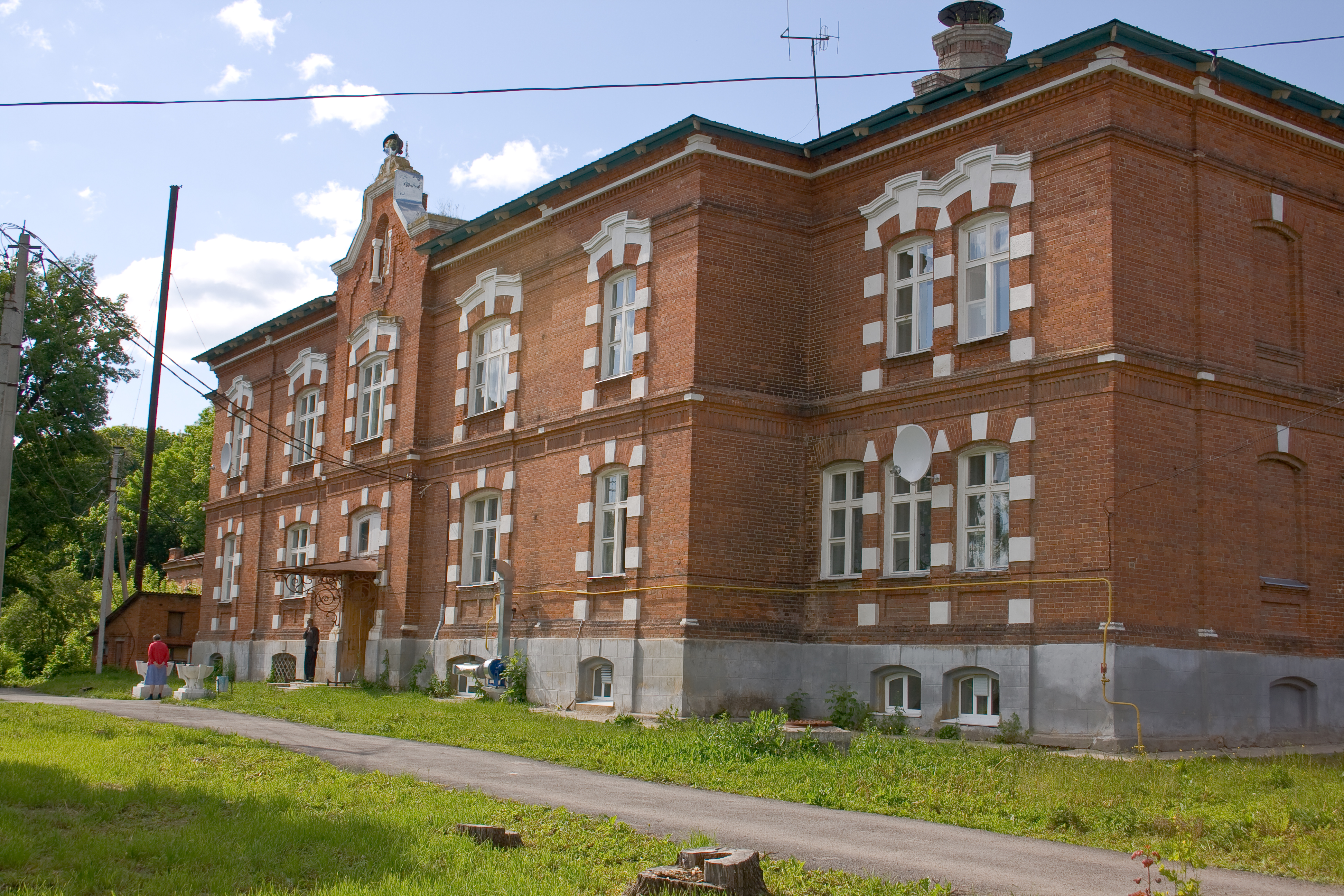 «Больница князей Гагариных», 1869 – 1873 гг. Находится в городе Плавске по ул. В. Ульянова, 74